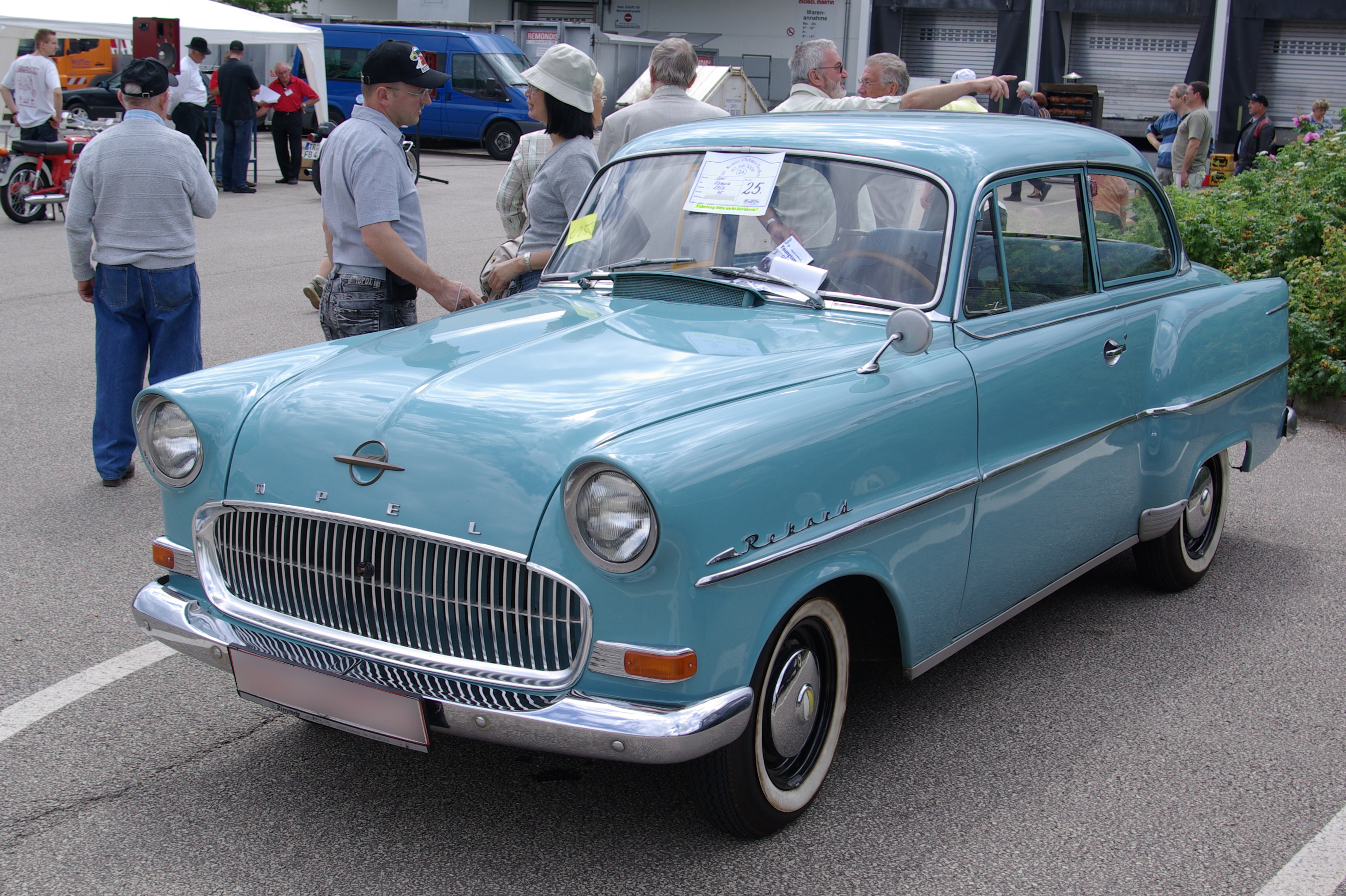 Opel Olympia Rekord Baujahr 1956 Leistung 45 PS